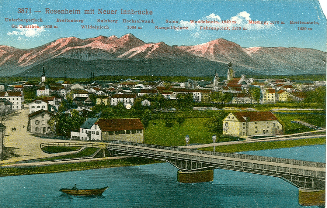 Postkarte, undatiert ( ca.1914 ). Beschriftung: "Rosenheim mit neuer Innbrücke".